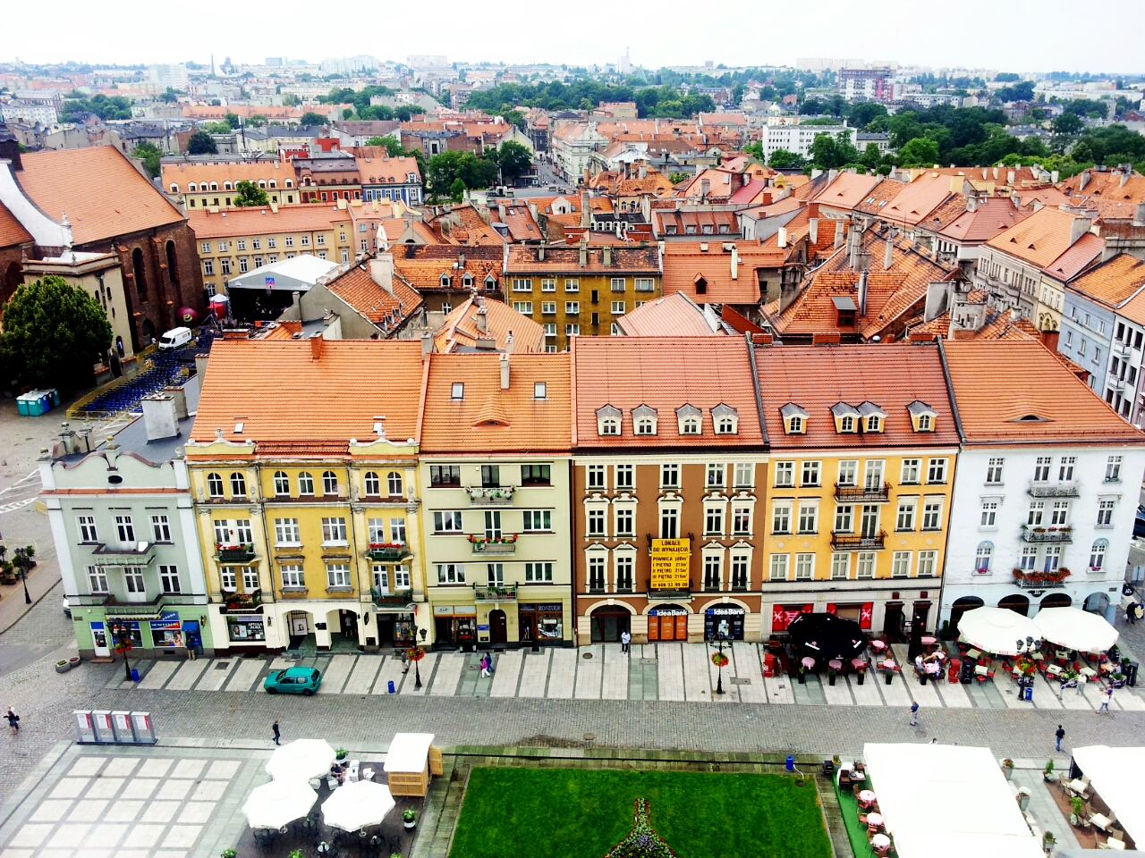 Miasto z ratuszowej wieży